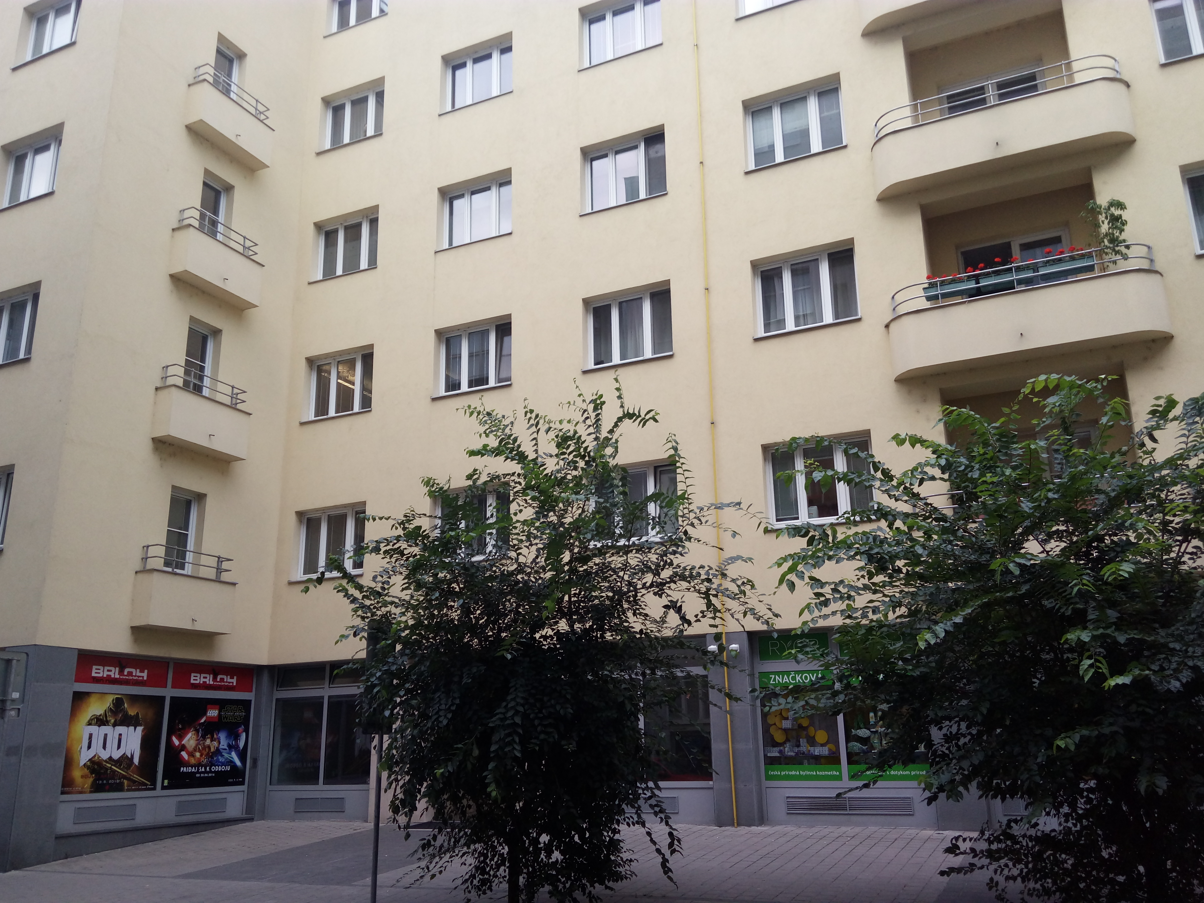 Heydukova 14, Staré Mesto, Bratislava